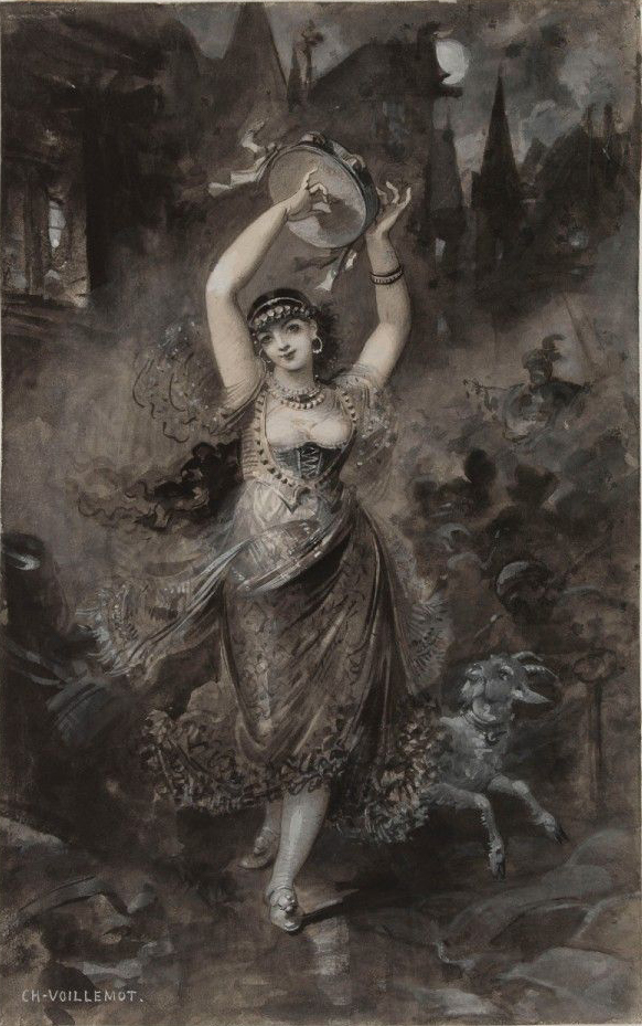 La Esmeralda dansant, illustration de Charles Voillemot pour le livret de Le Esmeralda, drame tiré du roman de Victor Hugo Notre-Dame de Paris, vers 1882.